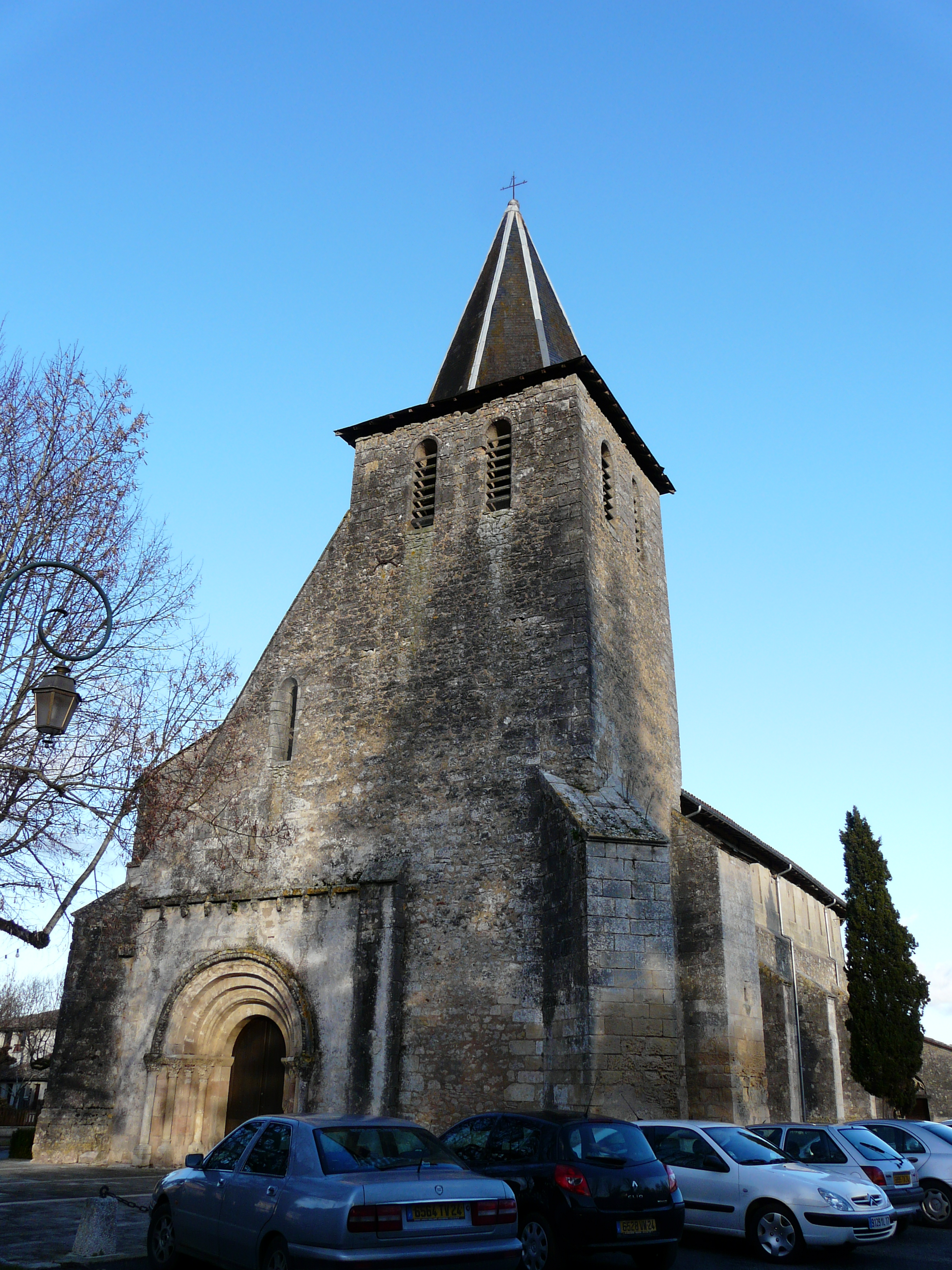 Vue depuis le sud-ouest, l'église Saint-Pierre-ès-Liens, Ménestérol, Montpon-Ménestérol, Dordogne, France Object location45° 01′ 01.8″ N, 0° 09′ 15.2″ E